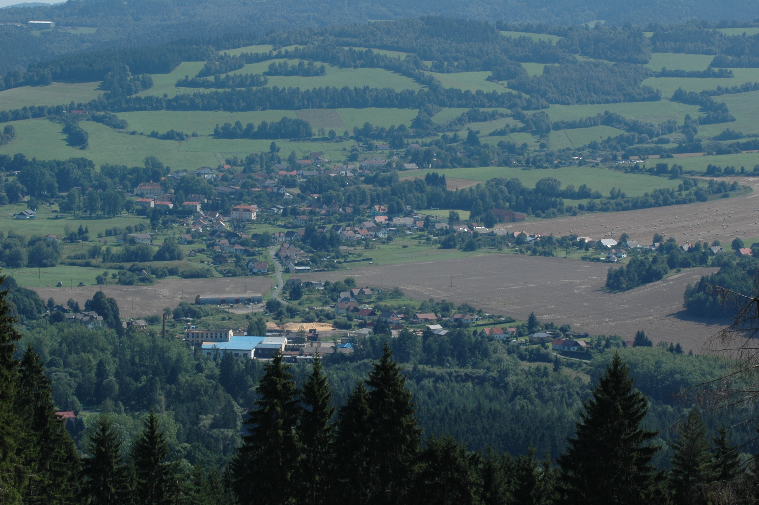 Dlouhá Ves v okresu Klatovy